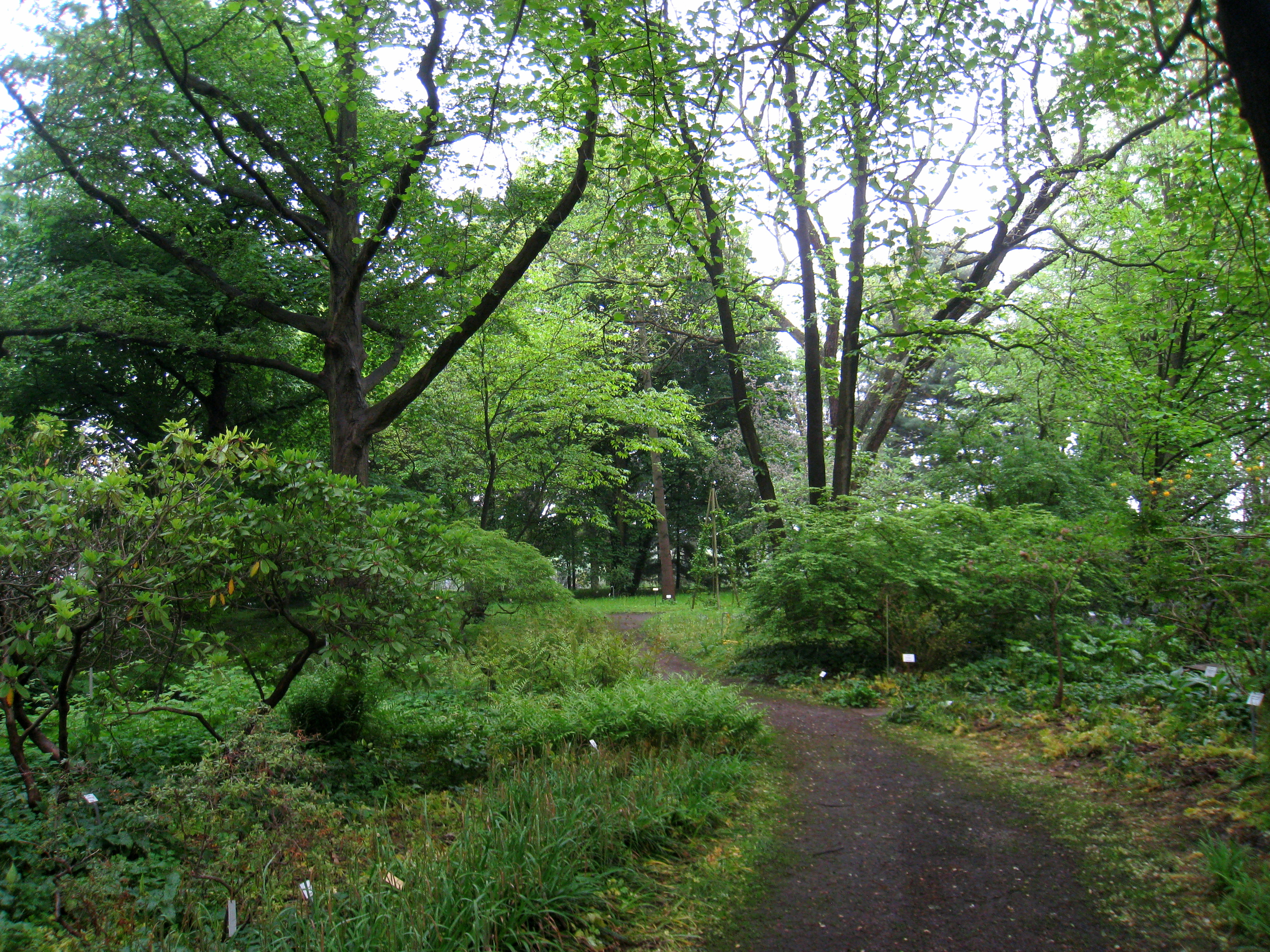 Späth-Arboretum, Berlin, Germany.